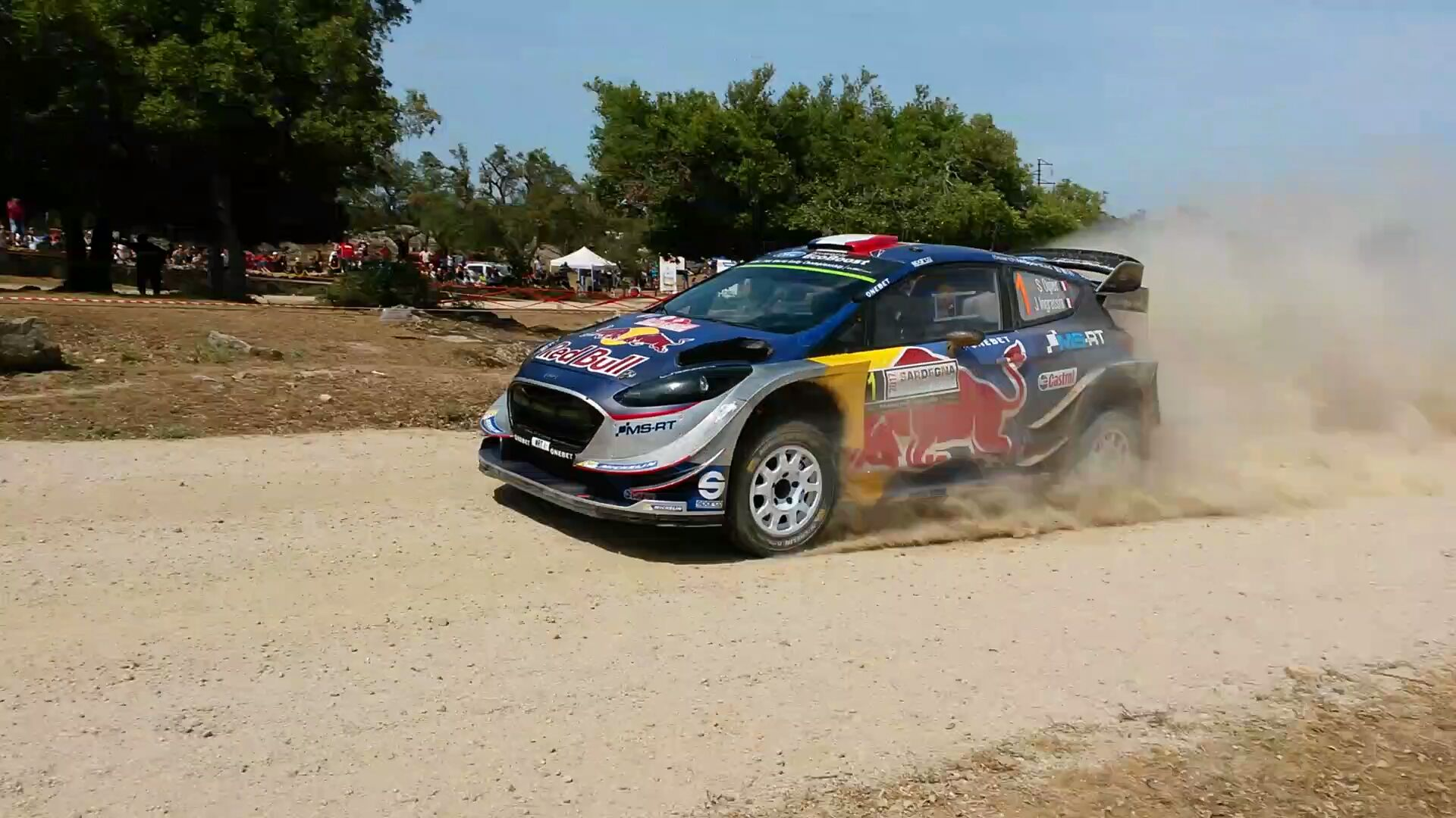 Sebastien Ogier durante la prova speciale 13 "Coiluna-Loelle 2", in approccio al tornante che conduce al traguardo della ps.